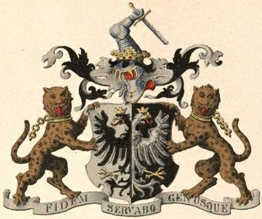 Browne-Camus´ suguvõsa krahvivapp